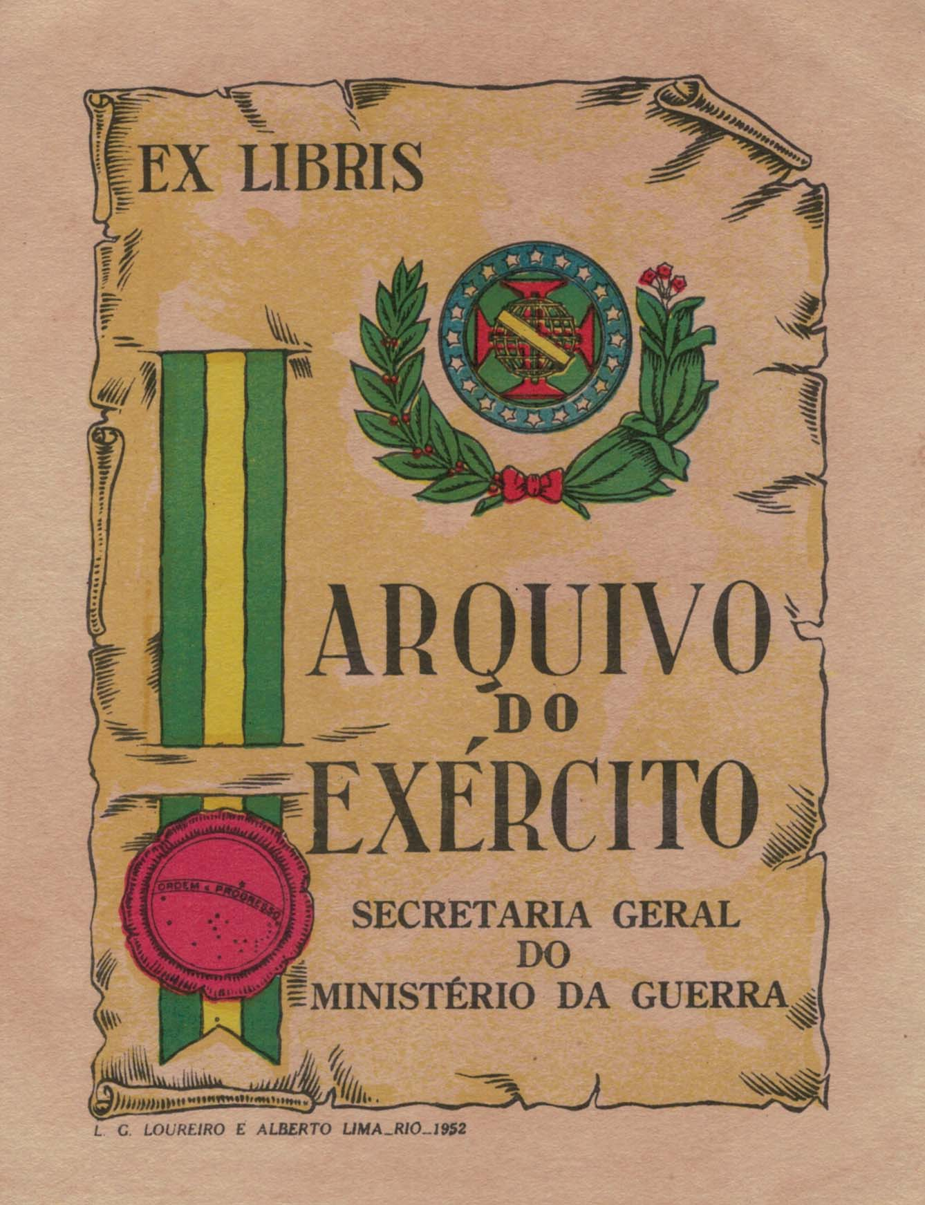 Ex libris do Brasil. Arquivo do Exército, feito por L G Loureiro e Alberto Lima. Foi feito para o Arquivo do Exército em 1952.